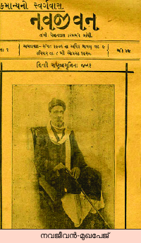 നവജീവൻ മുഖപേജ്